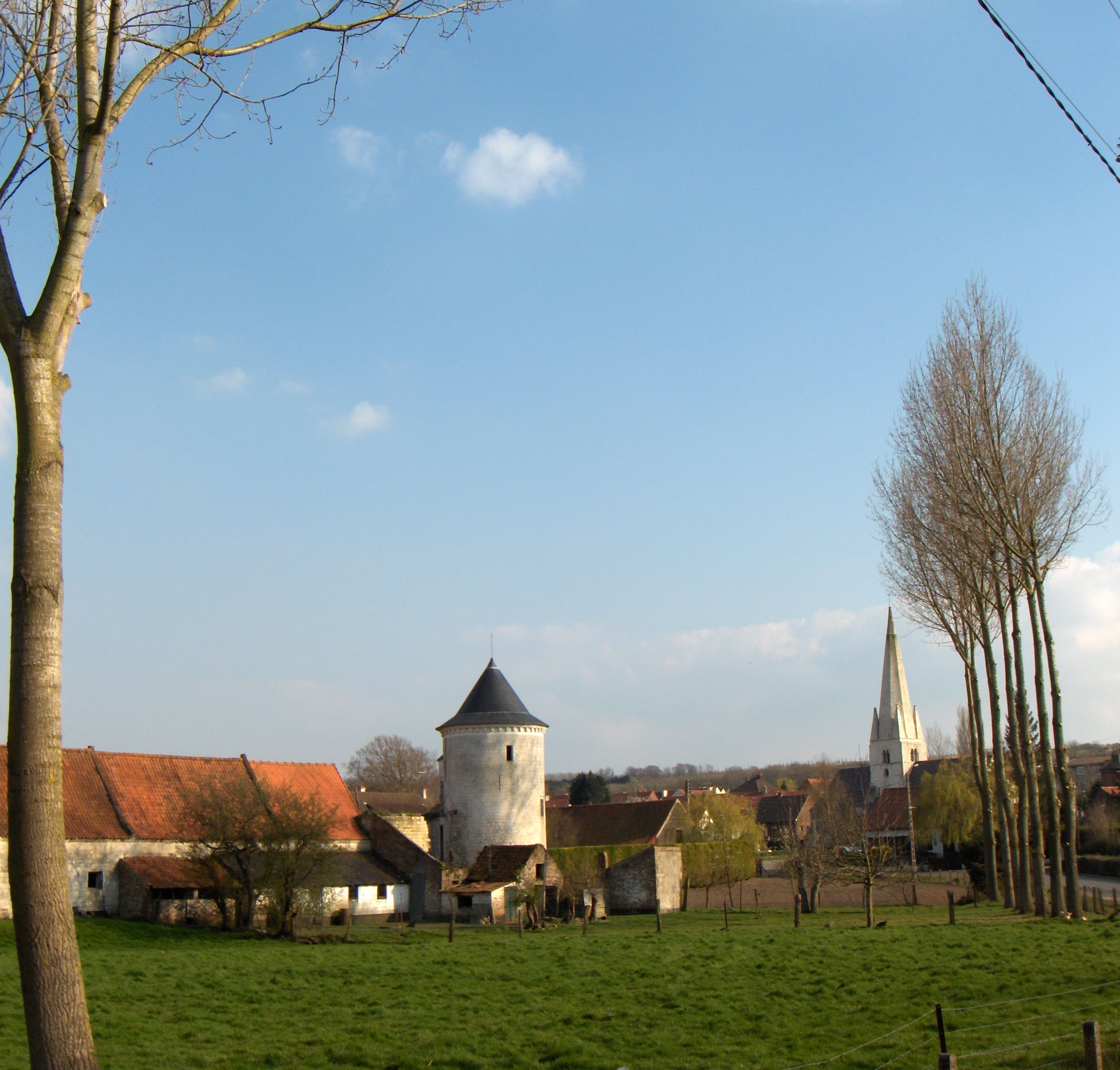 Esquerdes (Frankreich, Dept. Pas-de-Calais), alte Dorfmitte mit Schlossruine und Martinikirche (église Saint-Martin) des 12.-16. Jh.s.